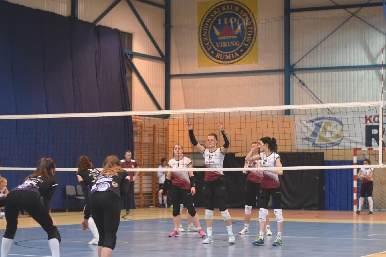 APS Rumia - Spójnia Stargard (05.01.2019)